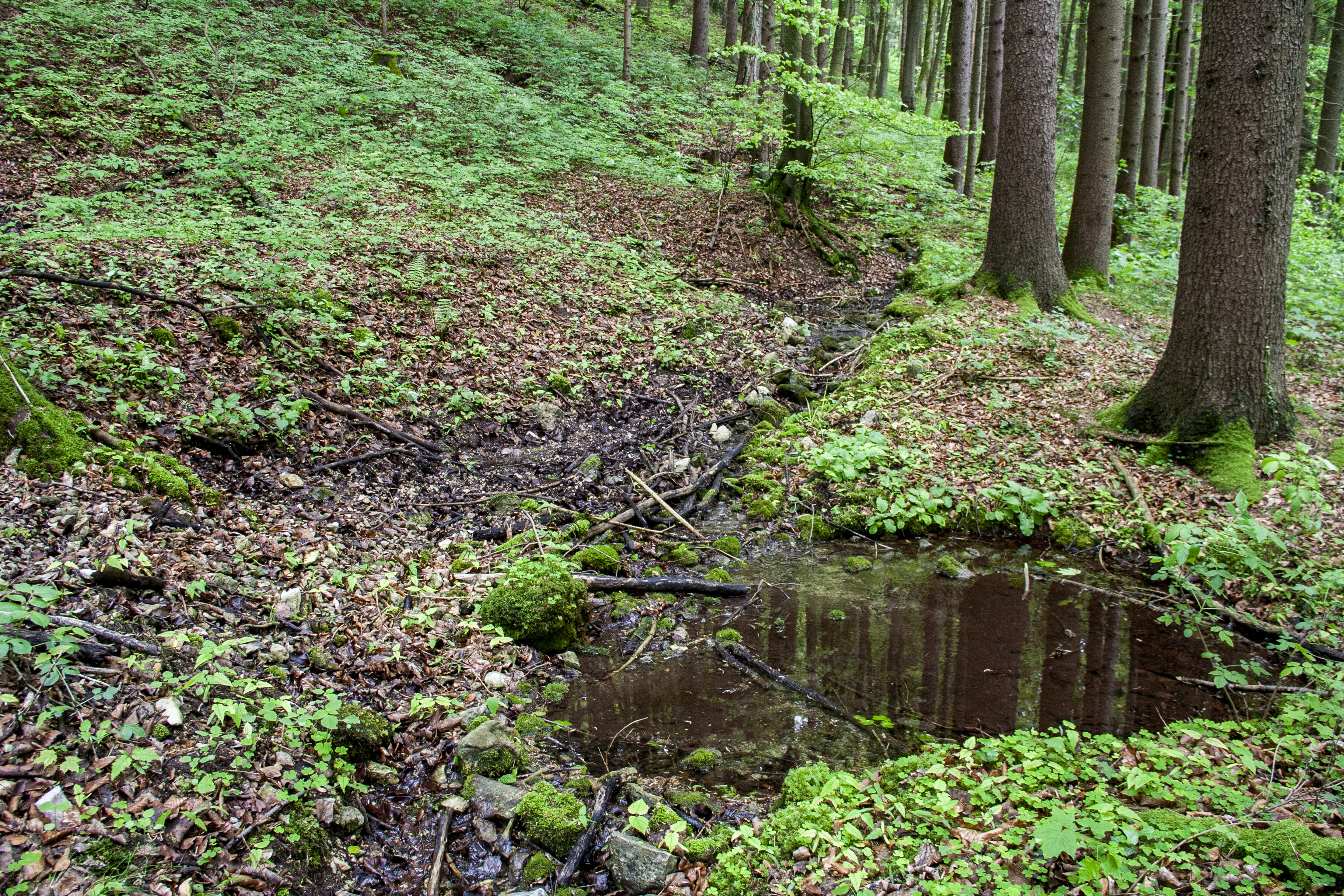 Steinerne Rinne, Thalheim, Happurg, Ausweisung des LSG "Südlicher Jura mit Moritzberg und Umgebung"